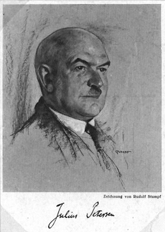 Porträtzeichnung des Literaturwissenschaftlers Julius Petersen (1878–1941).